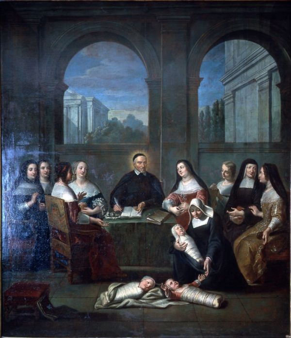 Tableau attribué à frère André, autour de 1732, peinture à l'huile. Conservé au musée de l'Assistance Publique - Hôpitaux de Paris depuis 1934